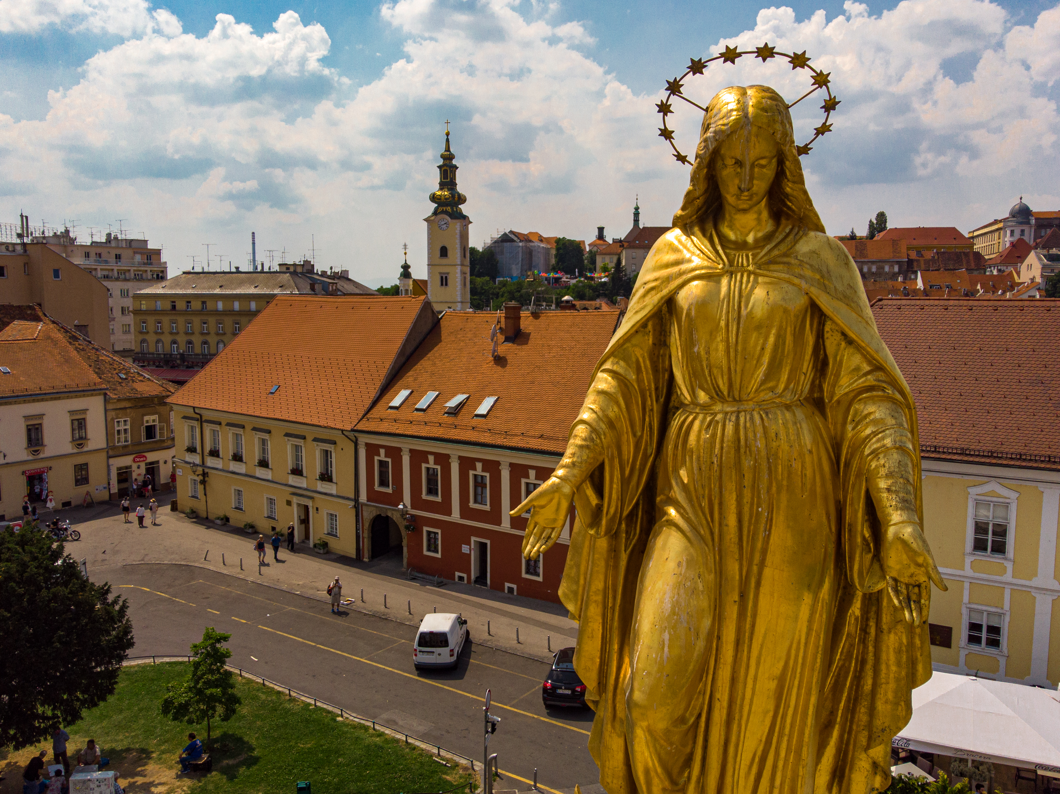 heilige Maria von Zagreb